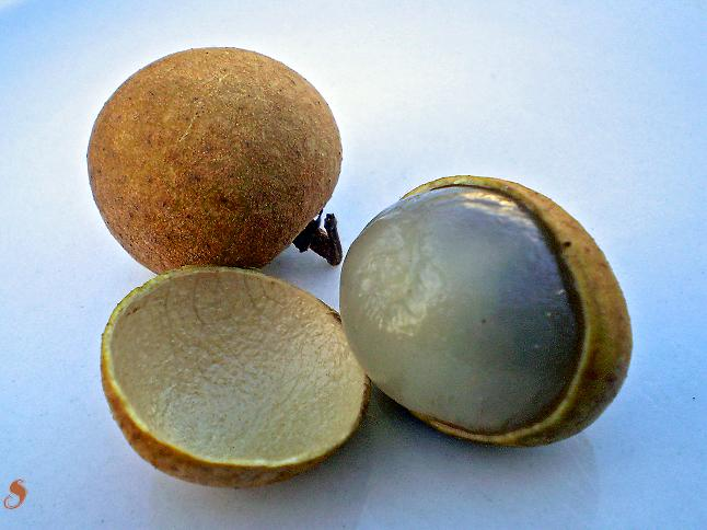 Fruta LONGAN (Dimocarpus longan)